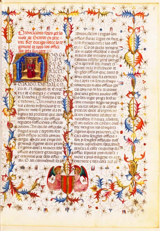 Ordinacions fetes per lo senyor en pere terz rey d'aragó sobre lo regiment de tots los officials de la sua cort Bibliothèque nationale de France BNF, ms. espagnol 99, f.1